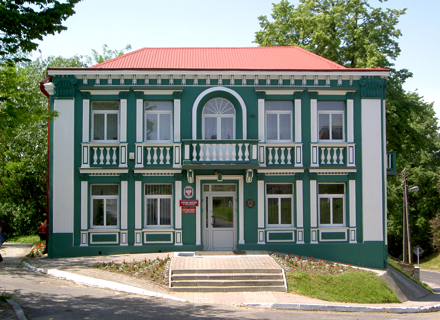 Tarnogród Poland - Building from 1930 • Tarnogród, Polska - Budynek z 1930 (t.zw. Pałacyk)